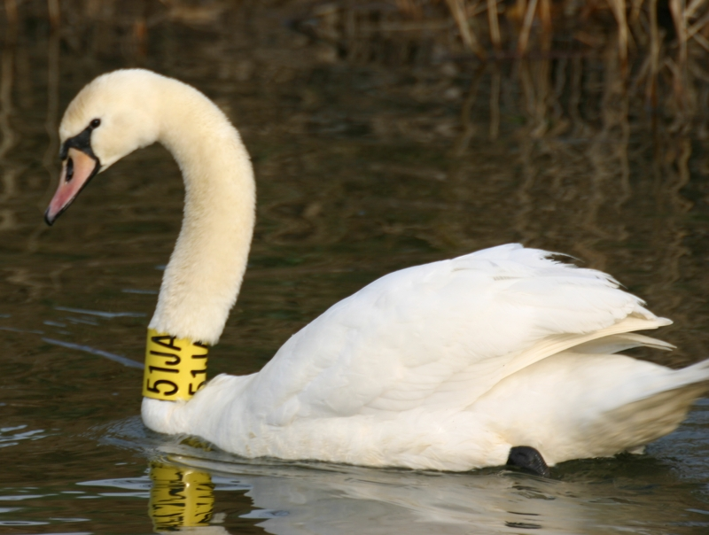 Nyakgyűrűs bütykös hattyú a Rábcán, Bősárkánynál (Győr-Moson-Sopron megye)